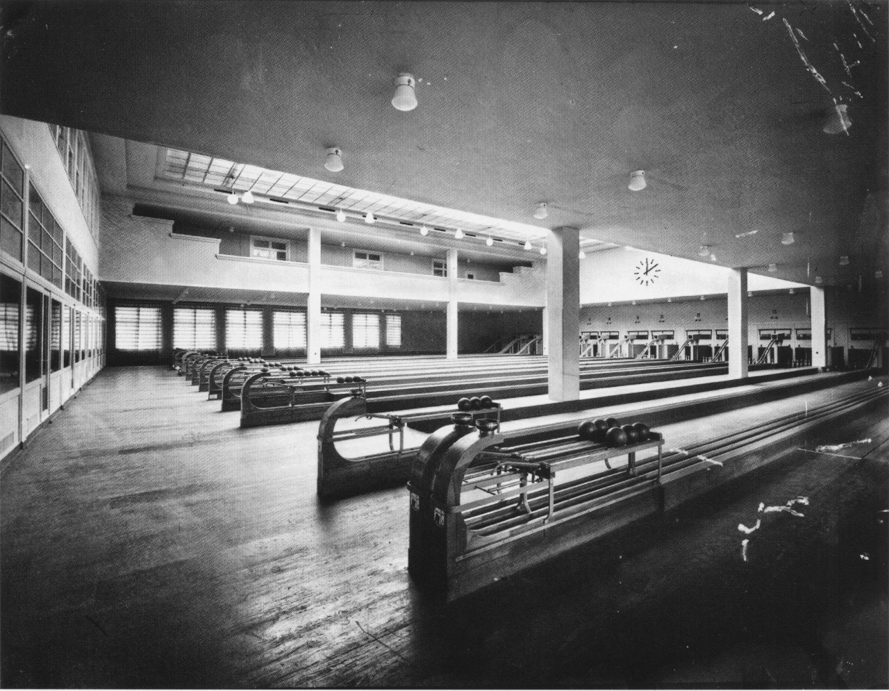 Innensicht der Großkegelanlage in der Elsterstraße 22-24, 1930. Eingeweiht wurde diese Anlage am 25. Mai 1930 und galt mit 45 Bahnen als die größte in Deutschland. Heute befindet sich dort das Haus Leipzig.